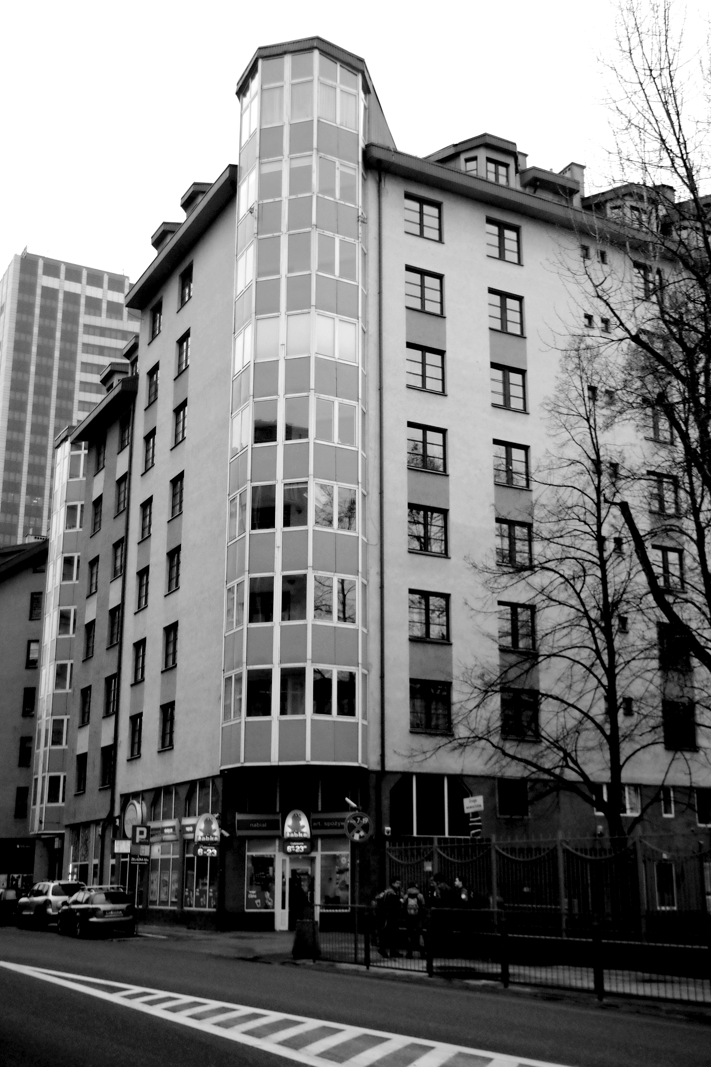 Budynek w którym 3 marca 2001 roku doszło do napadu na Filię nr 6 I Oddziału Kredyt Banku w Warszawie i zabójstwa czworga jego pracowników.